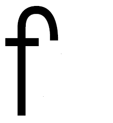 сихари